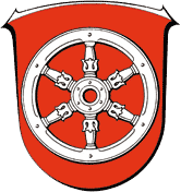 Wappen von Gernsheim